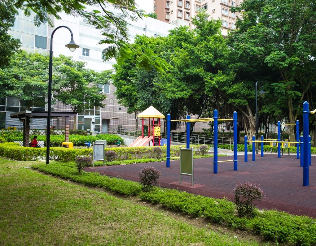 Wu Shan Recreation Playground2